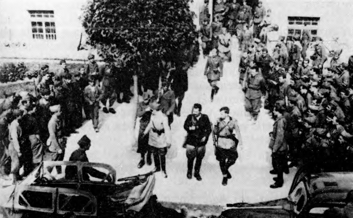 Komandant 14. divizije Mirko Bračič (desno) in komandant Gradnikove brigade Danilo Šorovič (levo) odhajata iz štaba 52. pehotnega polka italijanske divizije »Cacciatori delle Alpi«, kjer so bila 10. septembra 1943 pogajanja o predaji orožja.